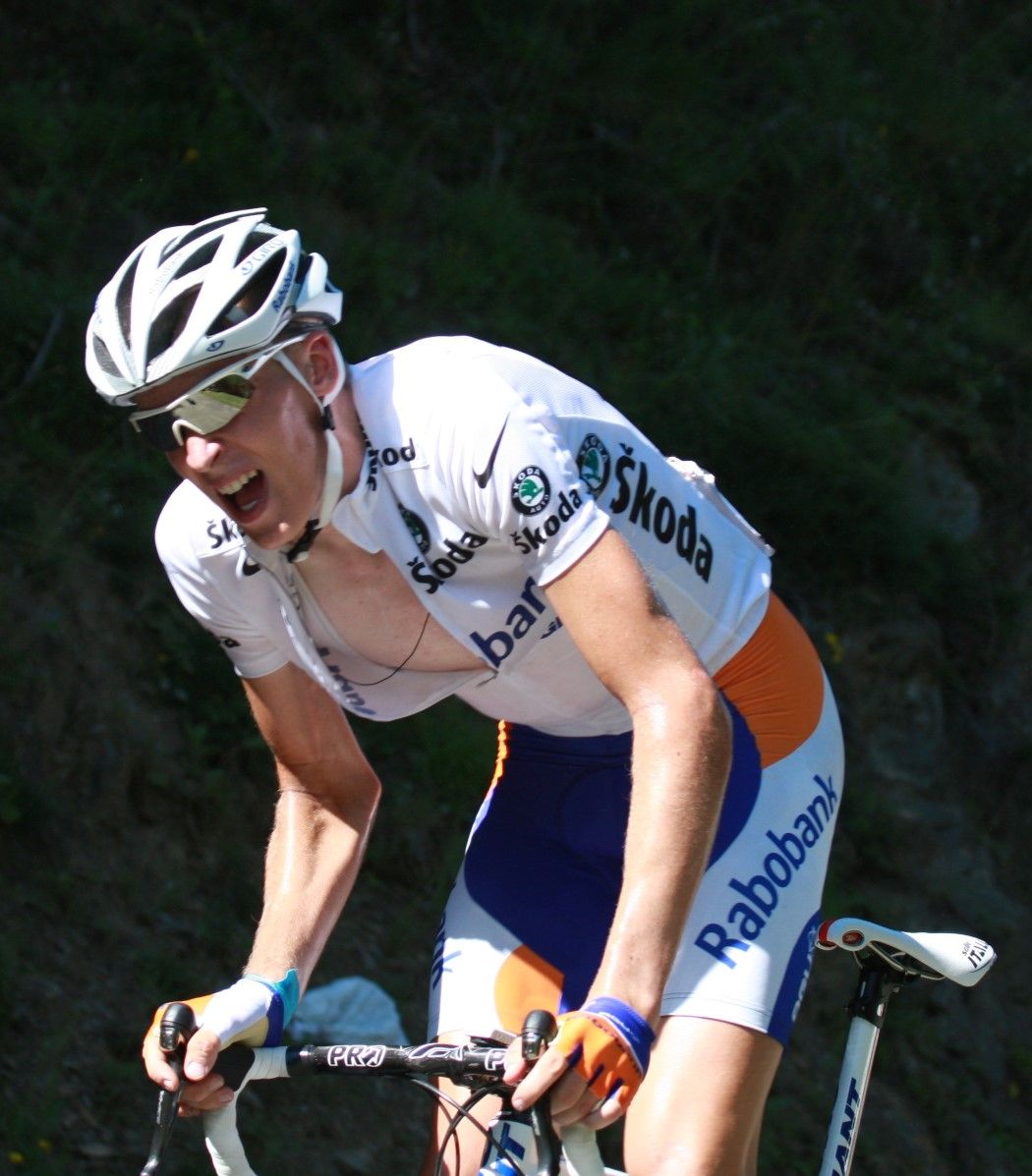 5700 gesink